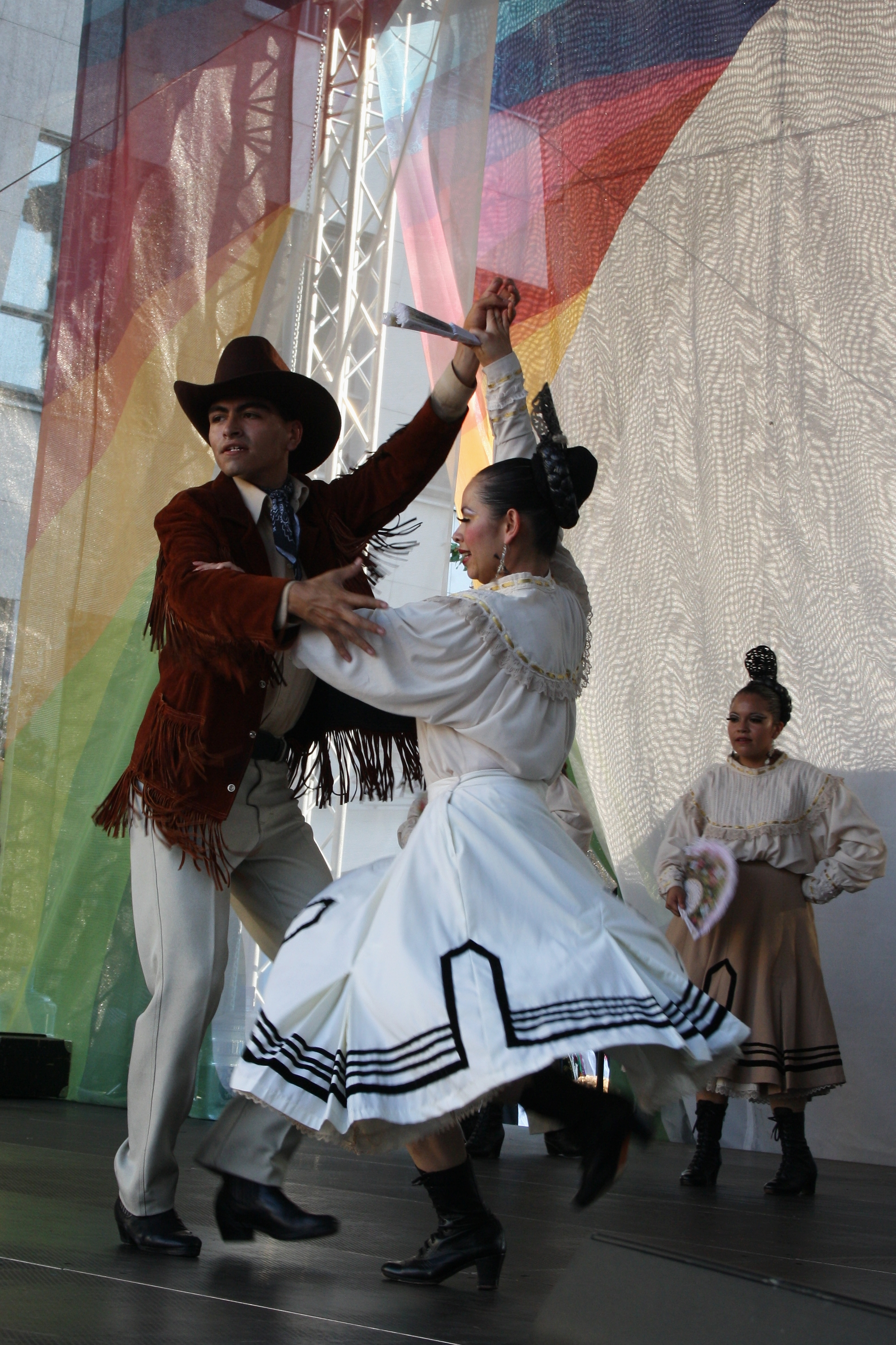 Pražský jarmark 2011 - z vystoupení mexické folklórní skupiny Tulancingo